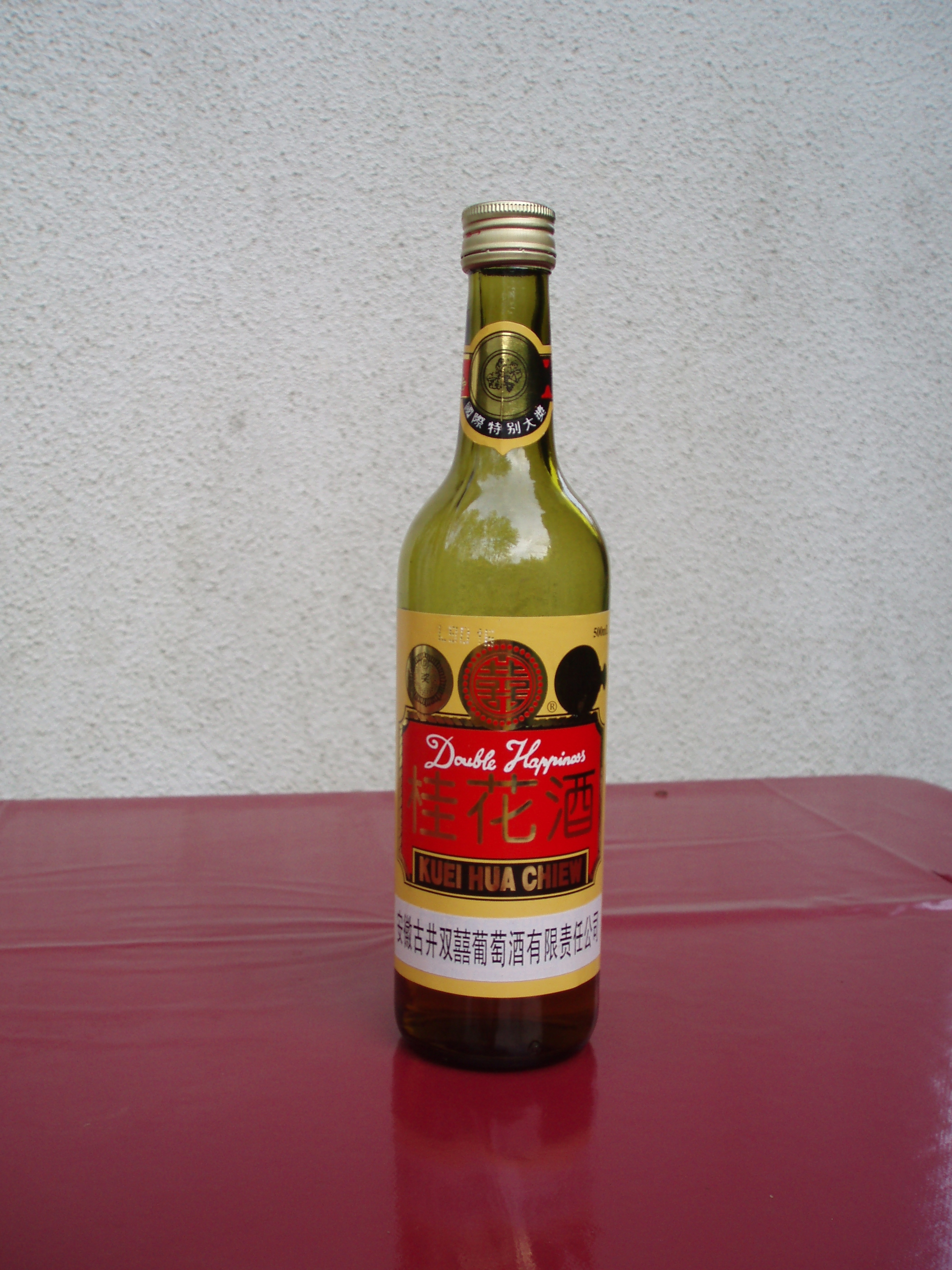 Chinesischer Duftwein: Eine (fast leere) 500-ml-Flasche